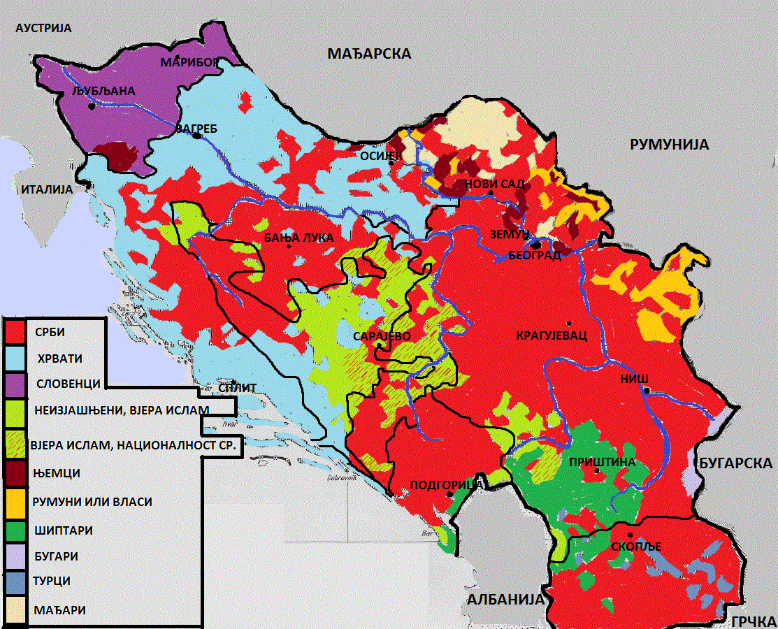 Етничка мапа Краљевине Југославије 1931. године